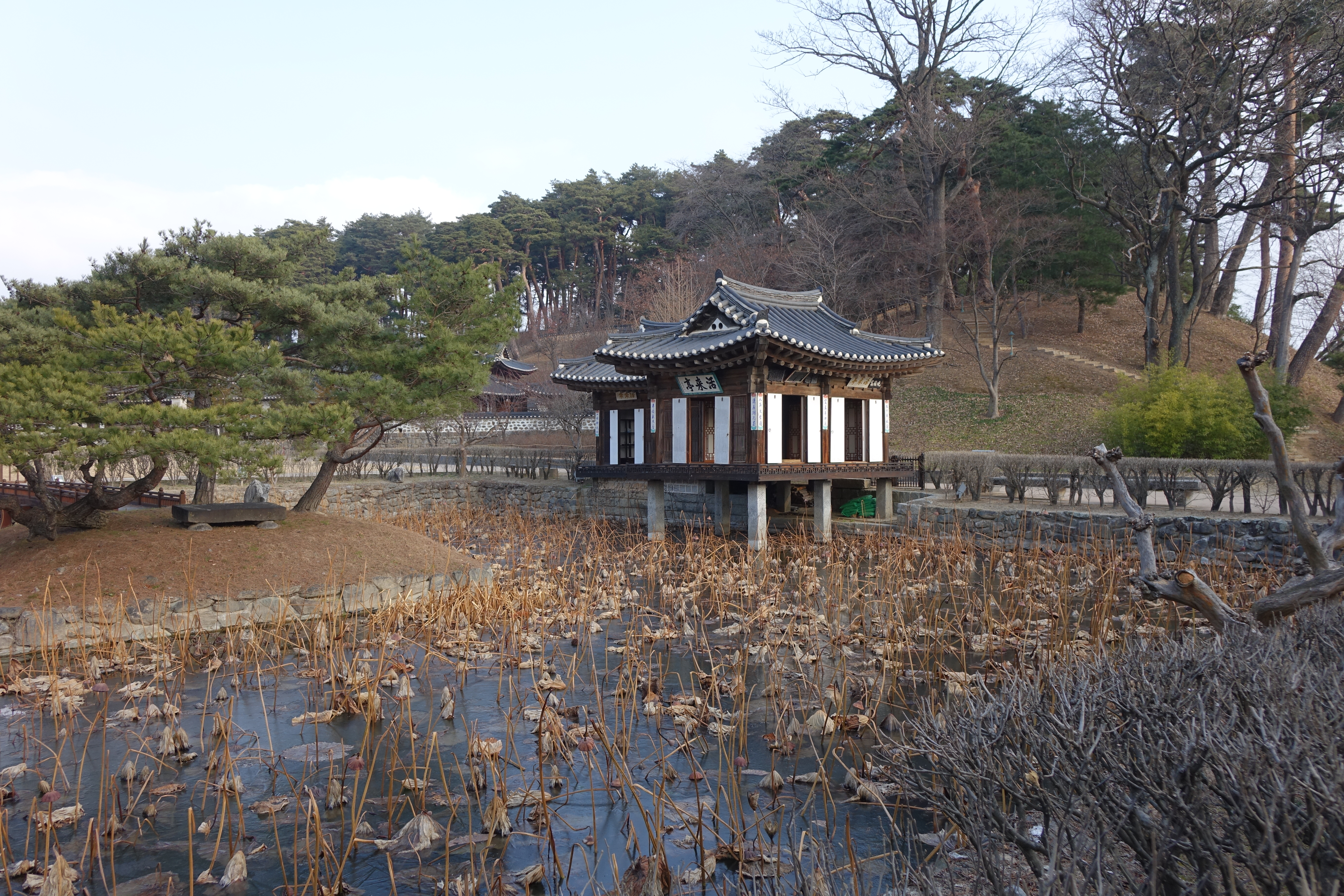 2015년 12월 강원도 강릉시